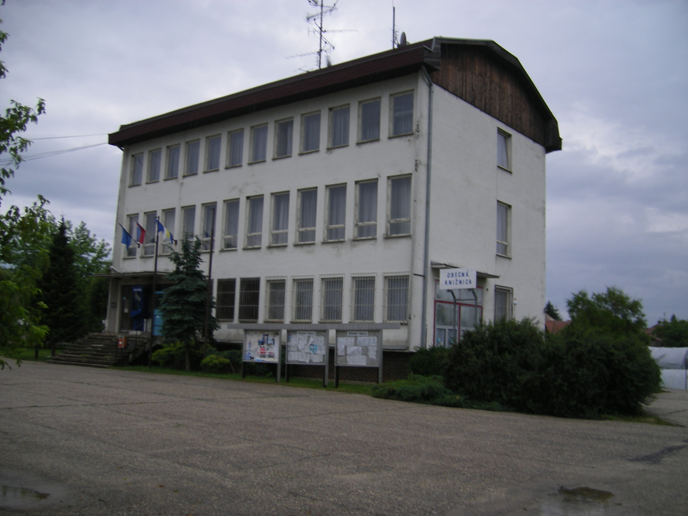 Dulovce (okres Komárno) municipal building